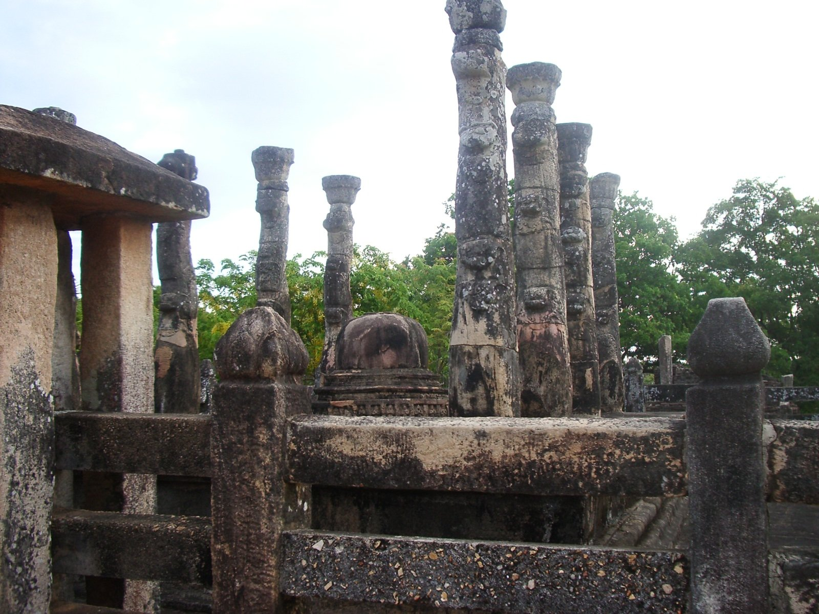 Temple a Polonnaruwa; foto feta per J. Ollé el juliol del 2006